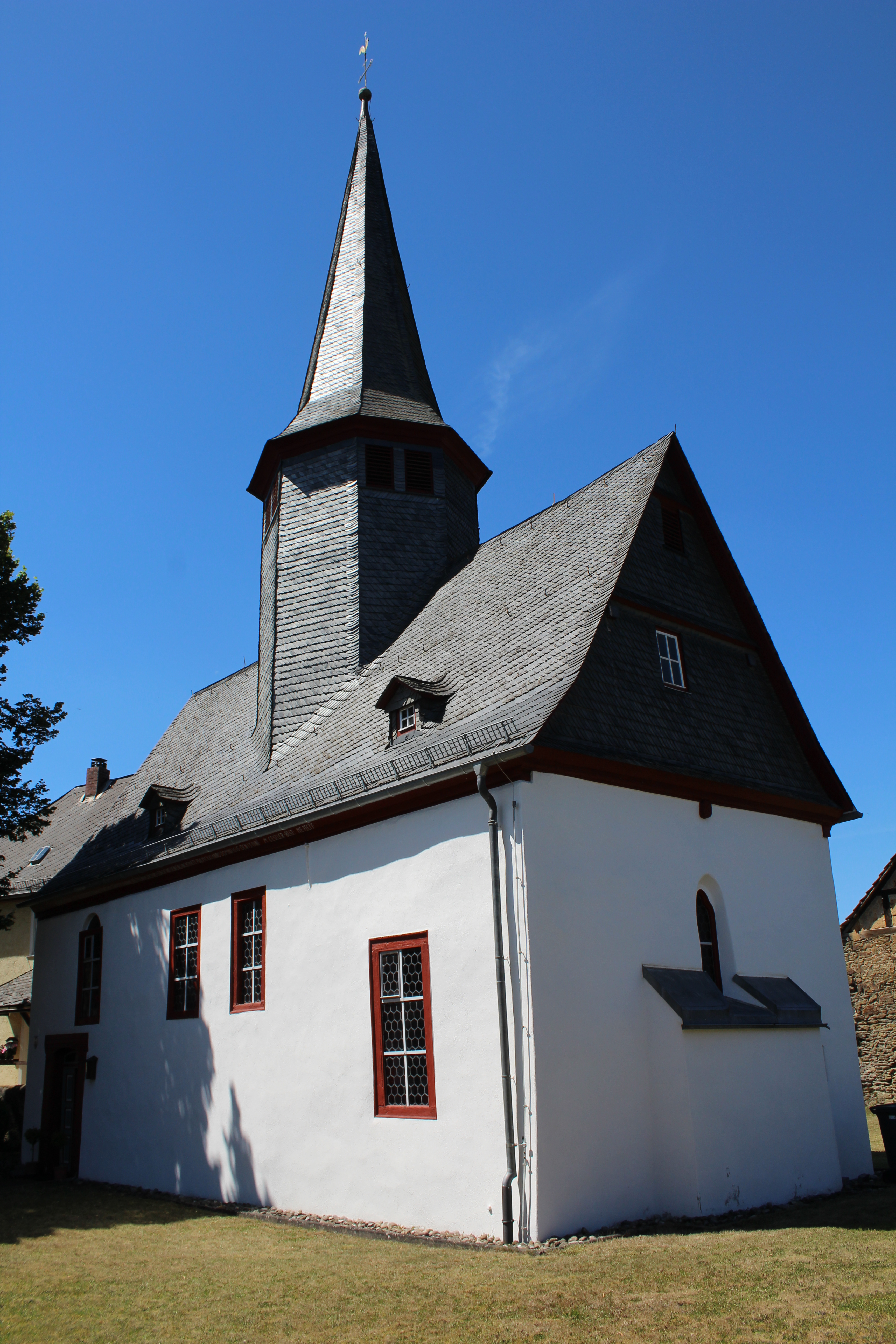 Evangelische Kirche Kraftsolms, Gemeinde Waldsolms, Hessen, Deutschland